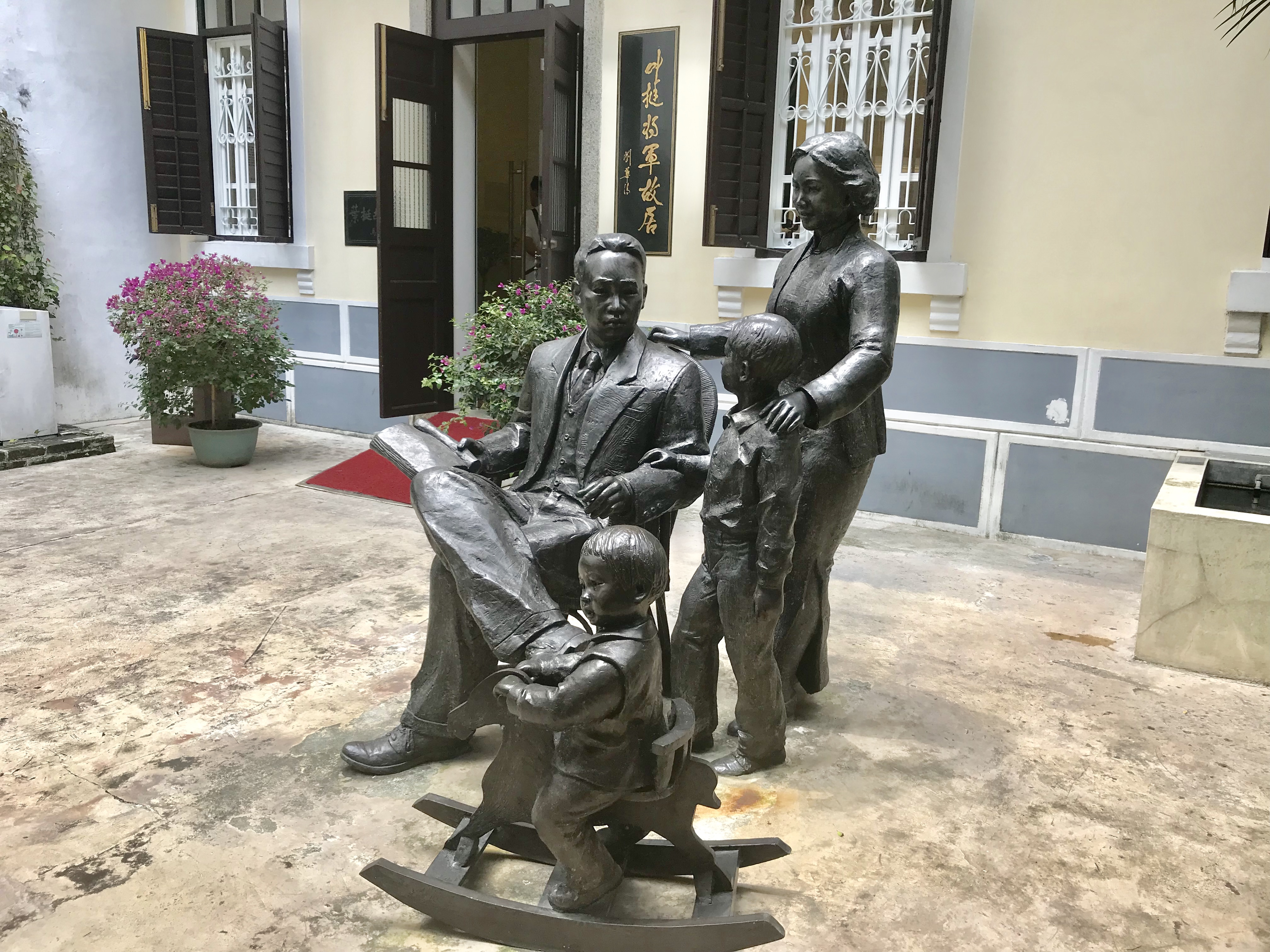 中文（台灣）: 澳门叶挺故居叶挺家庭群组雕像